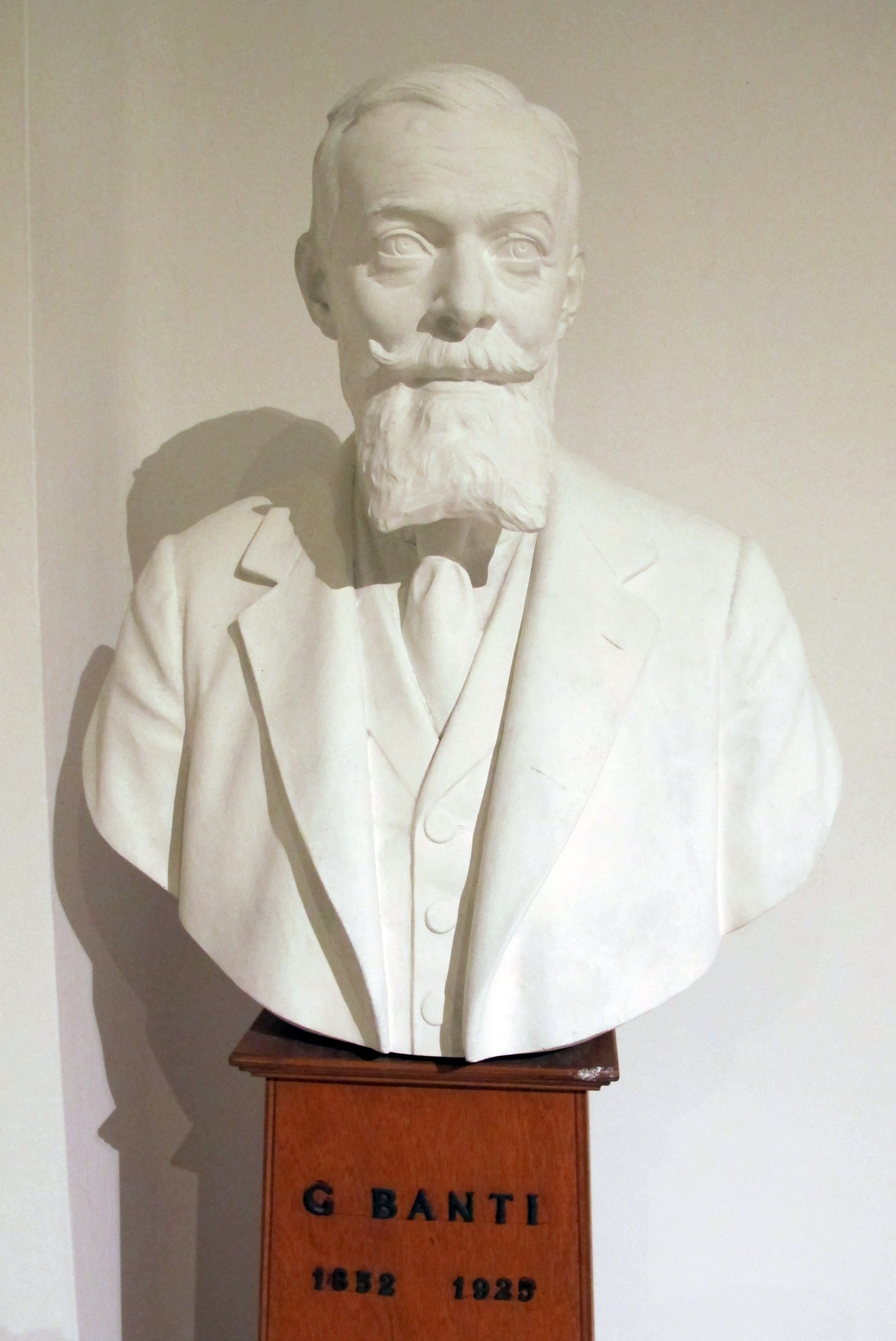 Istituto di anatomia patologica, museo, busto guido banti